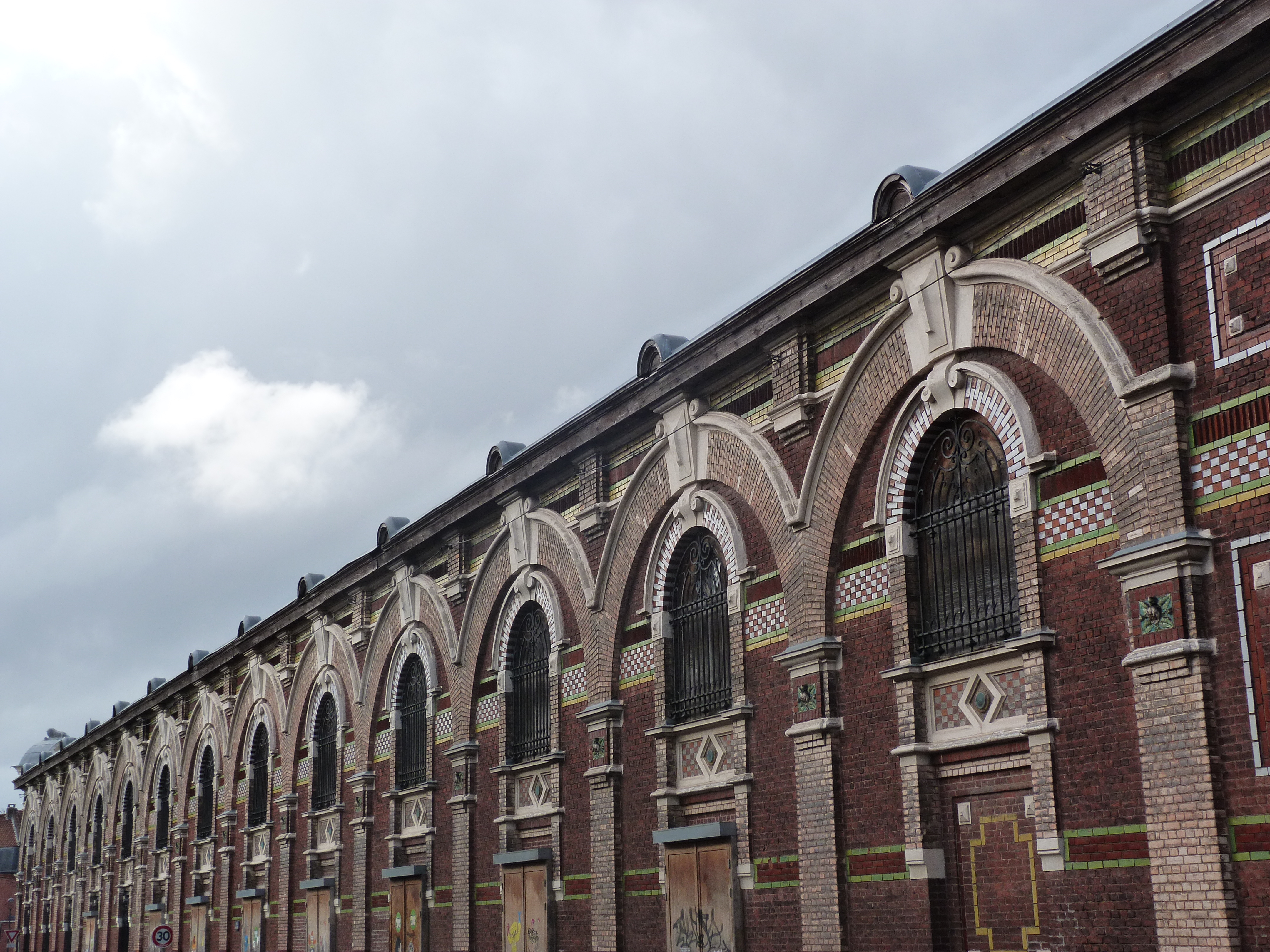 ancien bâtiment du conditionnement de la laine datant de 1901, la condition publique a été réhabilitée en 2004 et est désormais un lieu de création et de diffusion artistique.